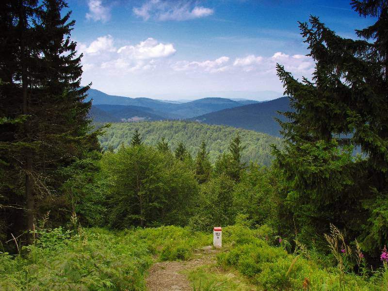 Szczyt Wielkiej Rycerzowej z widokiem w stronę Wielkiej Raczy i Przegibka. Widoczny słup Graniczny.